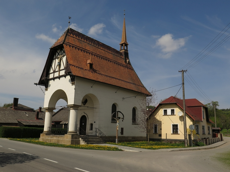 Kaple svatého Antonína Paduánského, na návsi, Pískov.